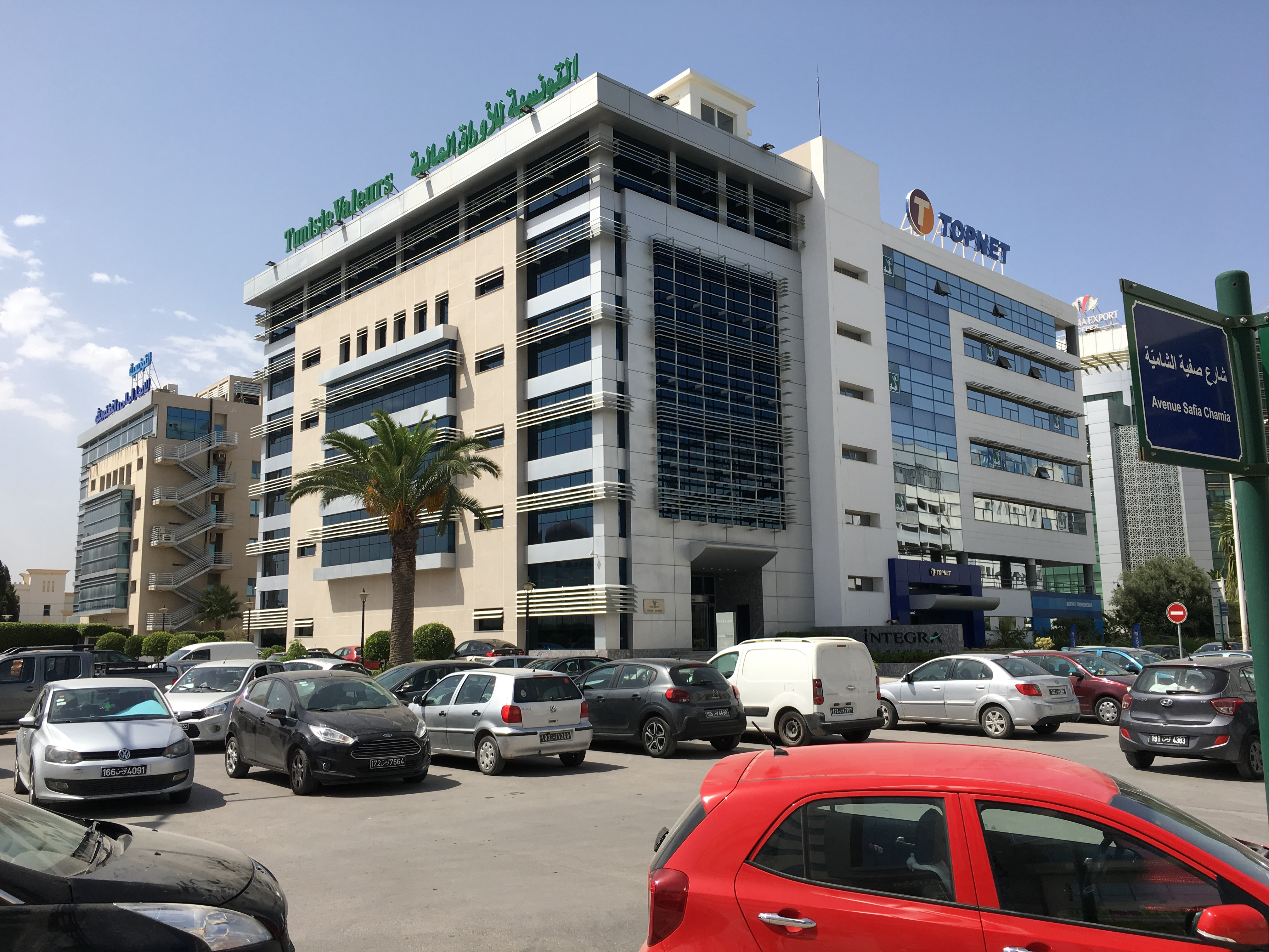 Sièges de Tunisie Valeurs et de Topnet, Centre Urbain Nord, Tunis, 2019.